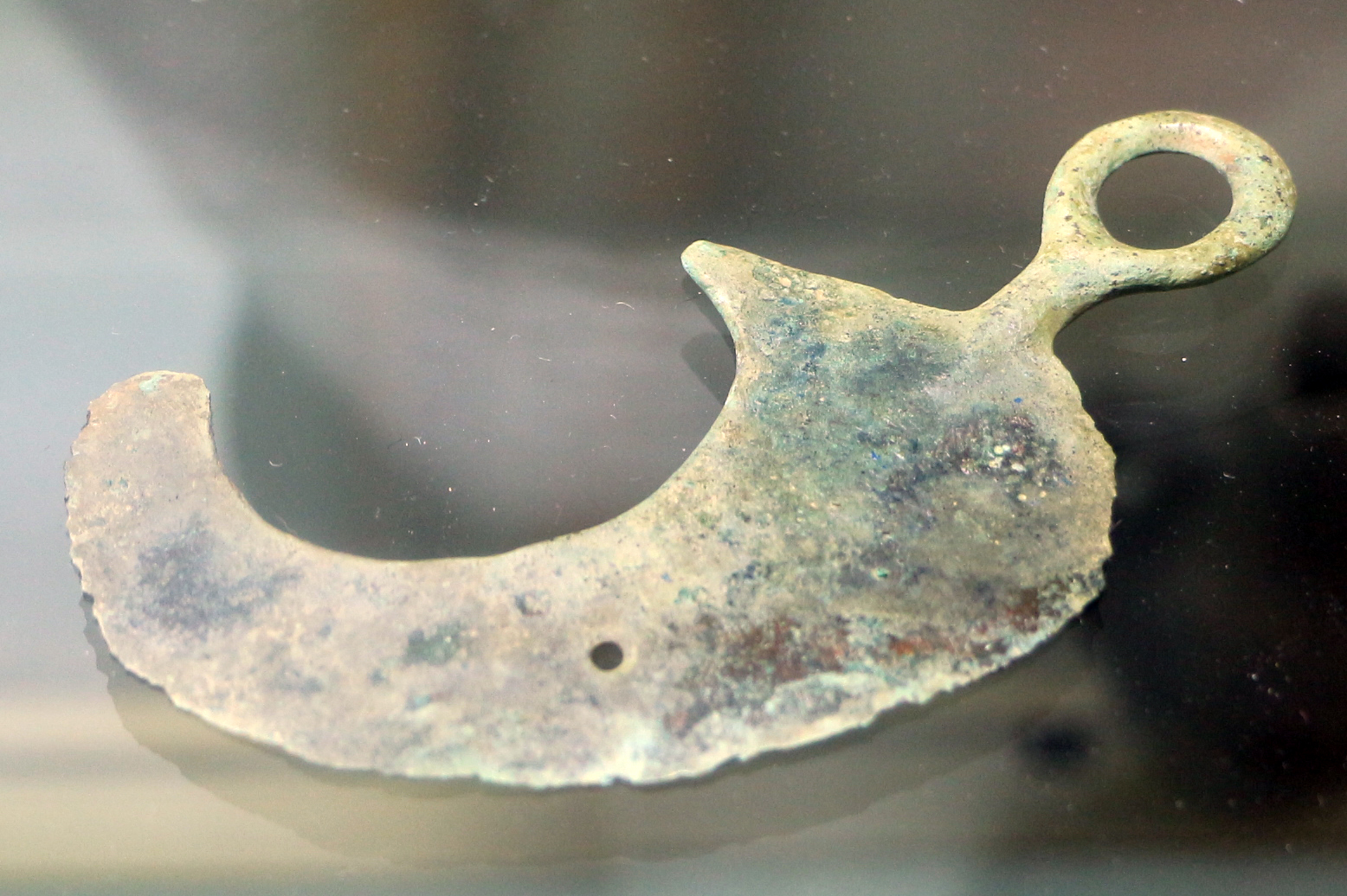 Museo Archeologico (Palazzo del Podestà) This is a photo of a monument which is part of cultural heritage of Italy.